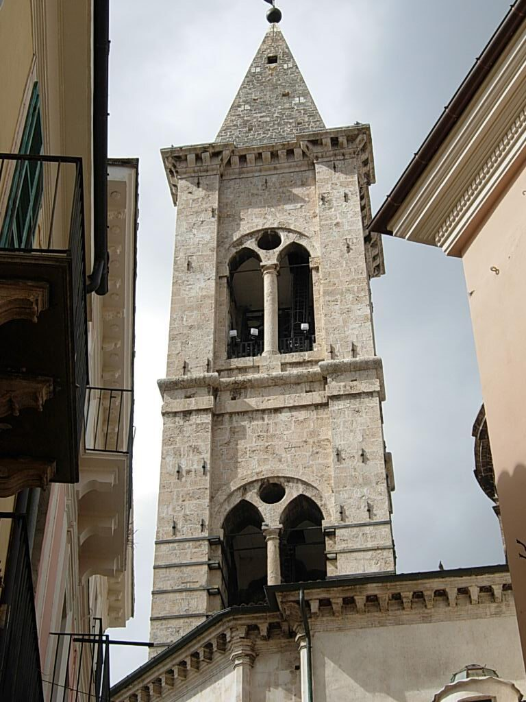 Particolare campanile - Complesso SS. Annunziata di Sulmona (AQ) Foto personale